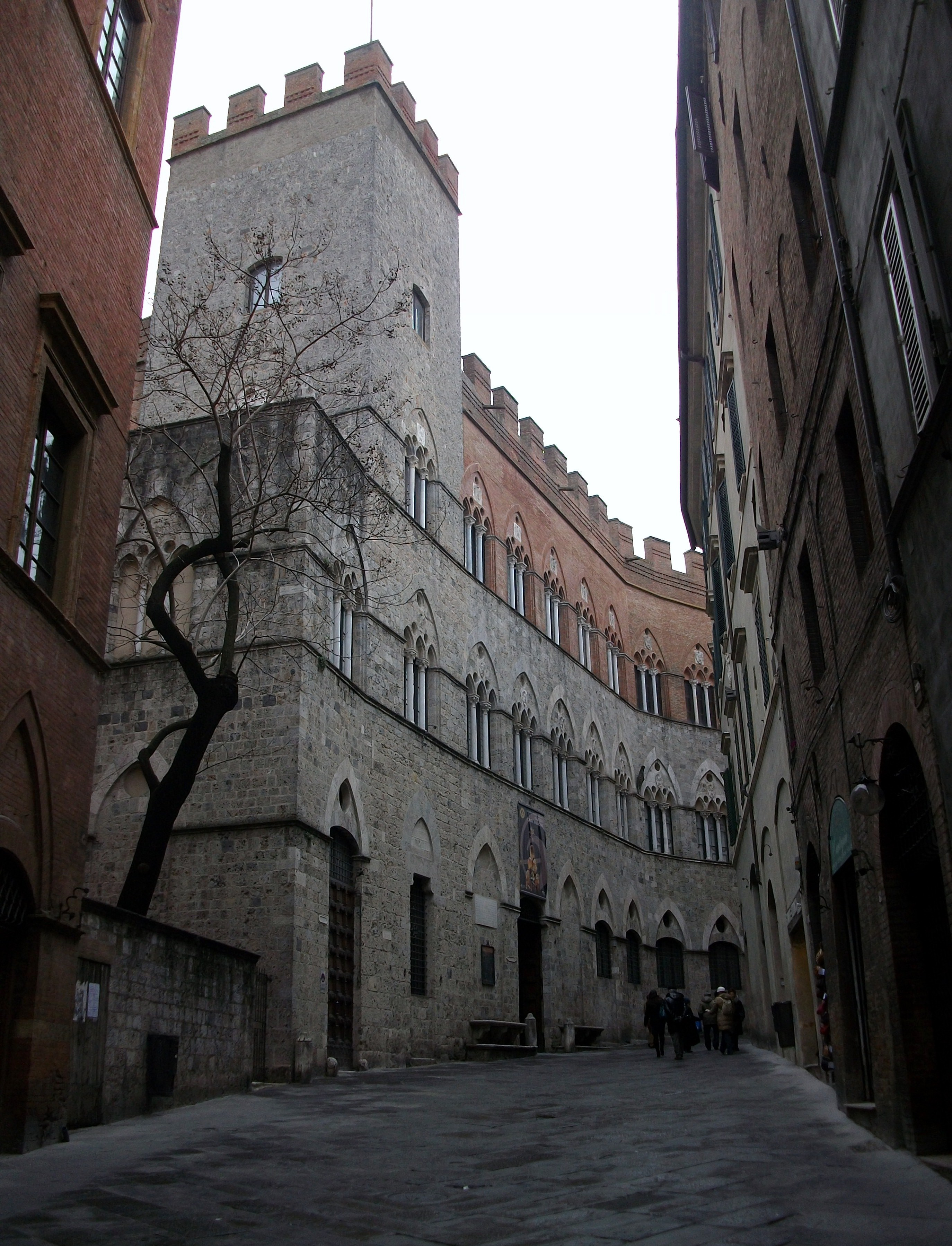 Palau Chigi Saracini de Siena.